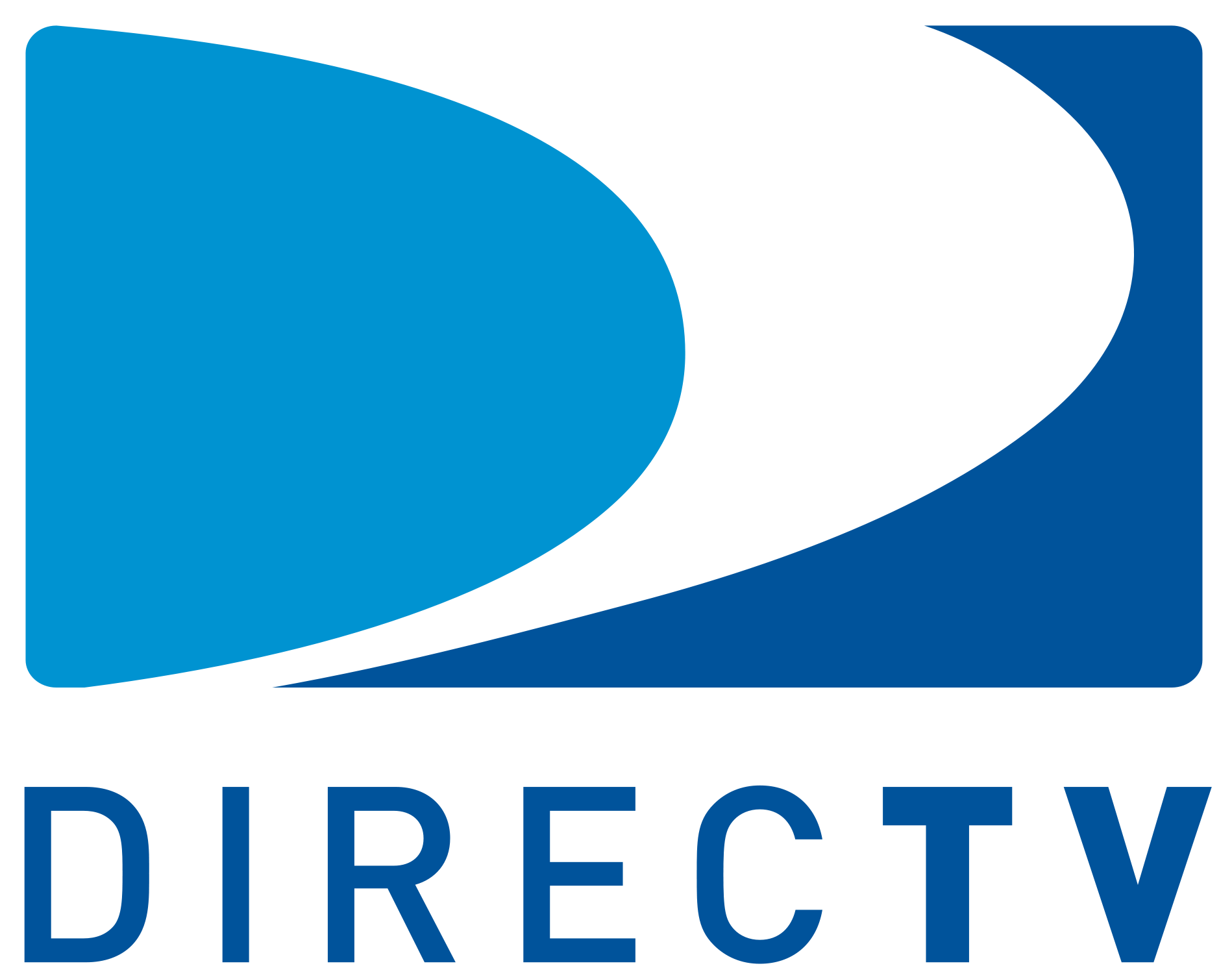 DirecTV es un servicio de difusión directa por satélite en vivo con sede en El Segundo, California, Estados Unidos. Transmite televisión digital incluidos canales de audio y radio por satélite a los televisores fijos de Estados Unidos y América Latina.